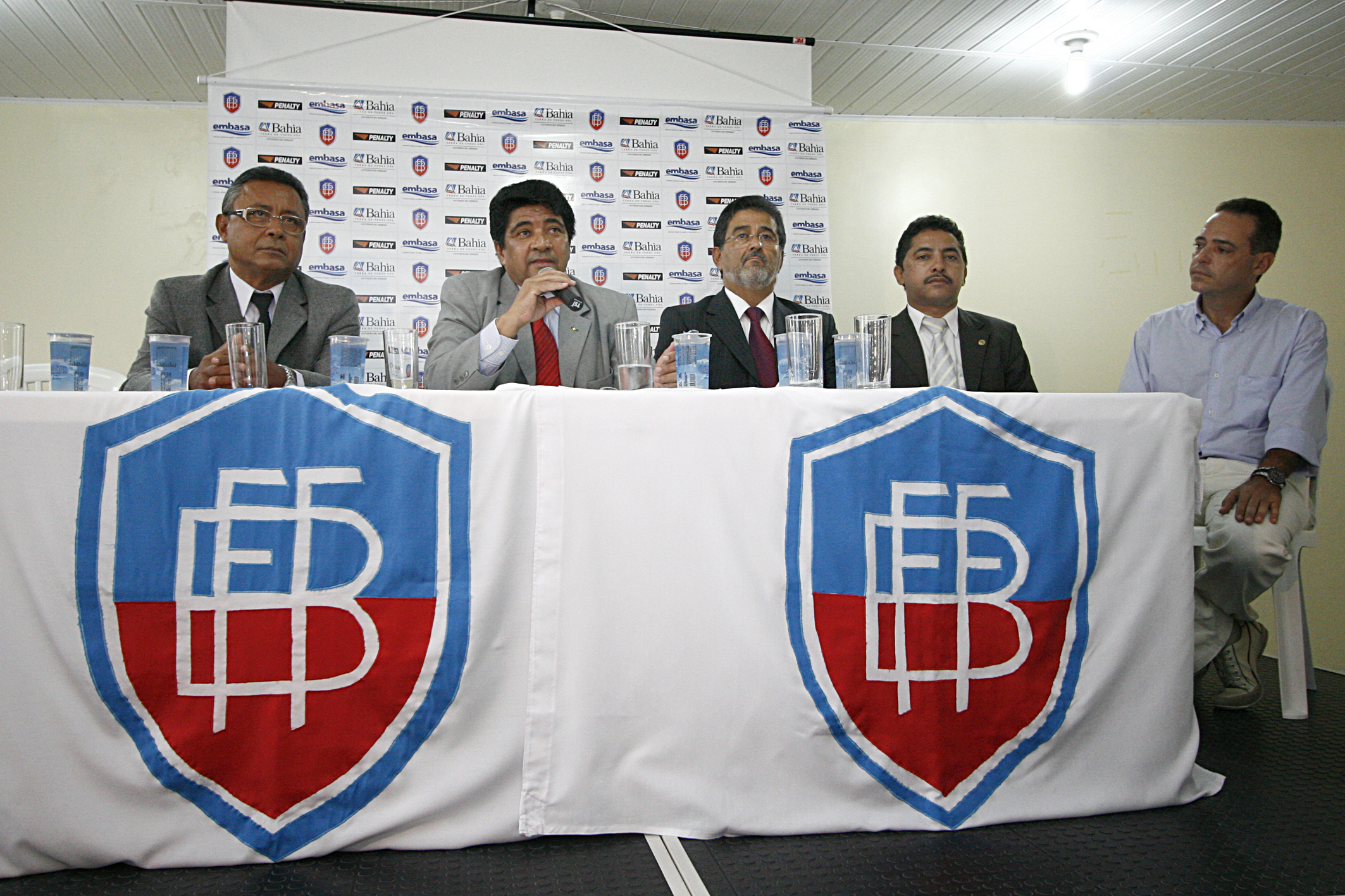 Embasa patrocina 10 clubes para o campeonato Baiano 2010 Na foto Ednaldo Rodrigues(Pres. da Federação Baiana de Futebol) Foto Ronaldo Silva/AGECOM